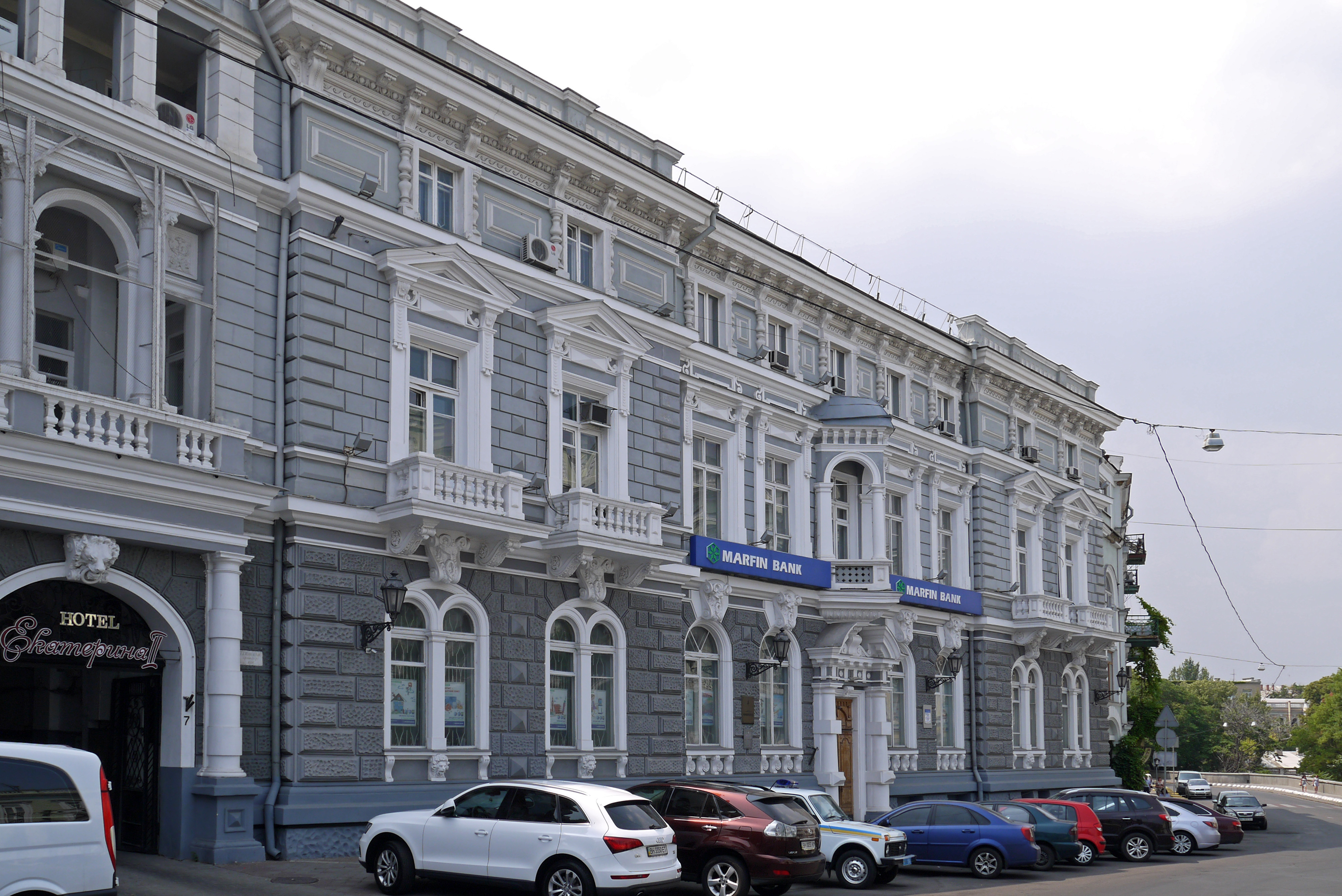 Будинок (Гагаріна), Одеса, Катерининська пл., 7а